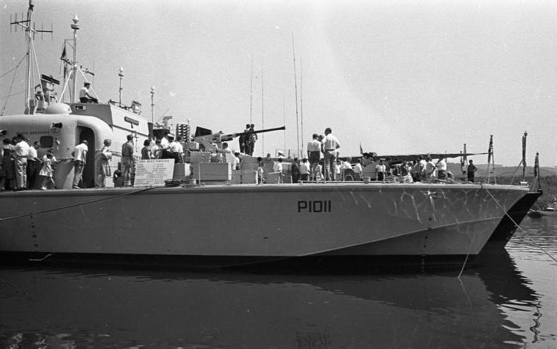 Britische Marine besucht den Rhein Strandkonzert in Oberwinter Besichtigung der Schiffe durch Publikum Information added by Wikimedia users.Das britische Schnellboot HMS Brave Borderer (P1011) am 2. Juli 1961 in Oberwinter am Rhein.